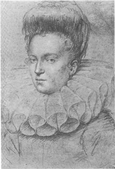 Ritratto di Felicita Guerrieri Gonzaga, Amante del Duca di Mantova Vincenzo I Gonzaga